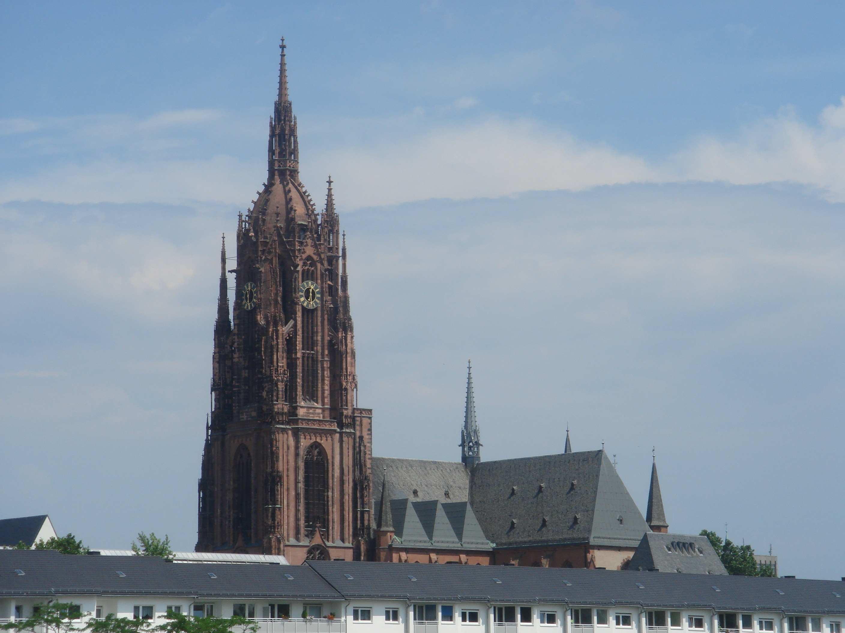 Kaiserdom St. Bartholomäus